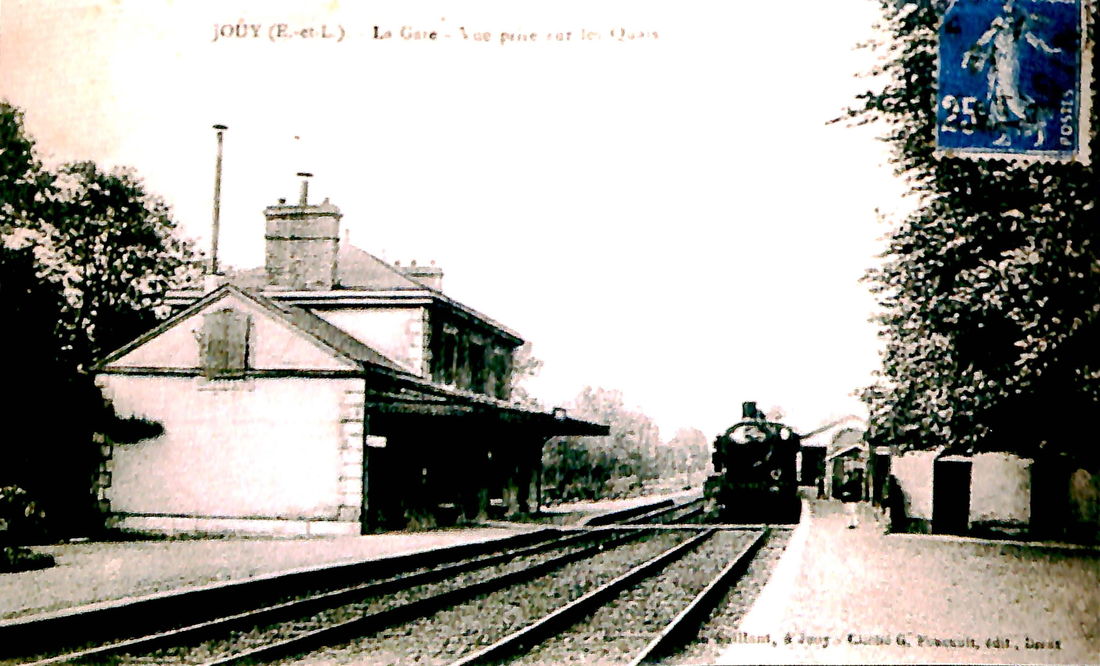 Carte postale ancienne montrant l'intérieur de la gare de Jouy (Eure-et-Loir) à la fin de XIXème siècle ou au début du XXème siècle.